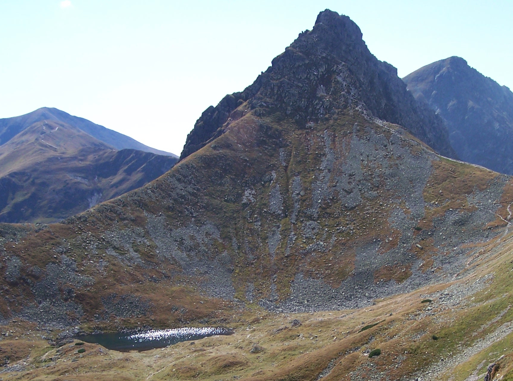 Rohacz Ostry, Wyżni Jamnicki Staw (West Tatra Mountains)